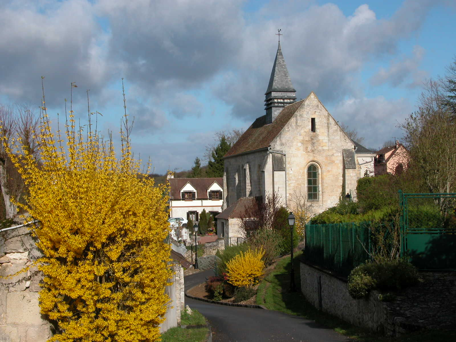 Eglise Paroissiale Saint-Martin